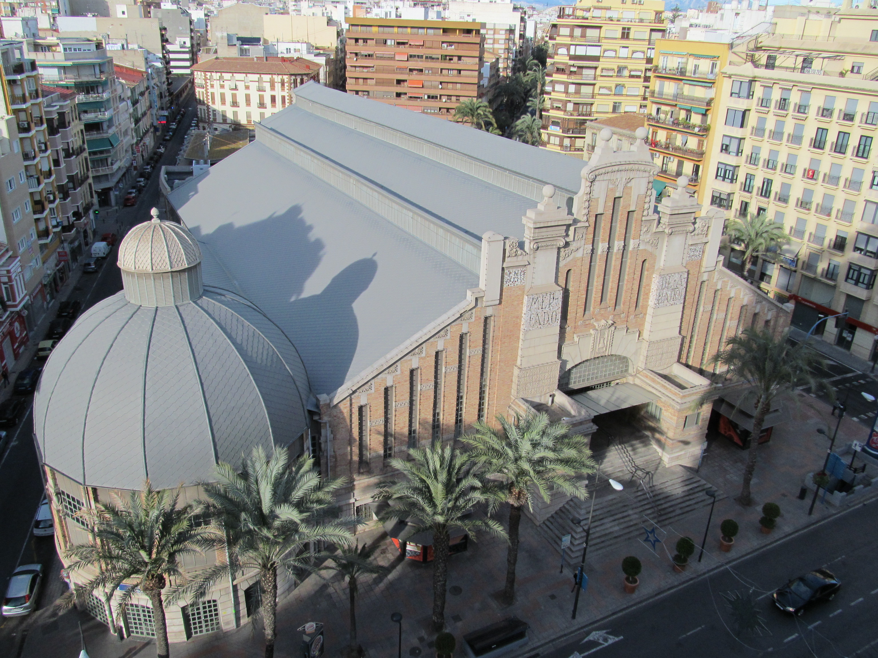 Le Grand Marché Central d'Alicante (Espagne)